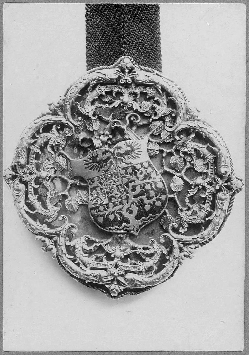 Stadhuis: Geëmailleerd zilveren draagteken van de gemeentebode